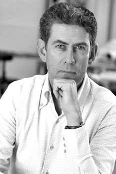 Portrait von Heiner Meyer